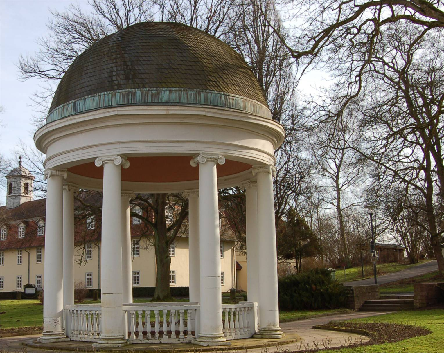 Hofgeismar, Brunnentempel am Gesundbrunnen